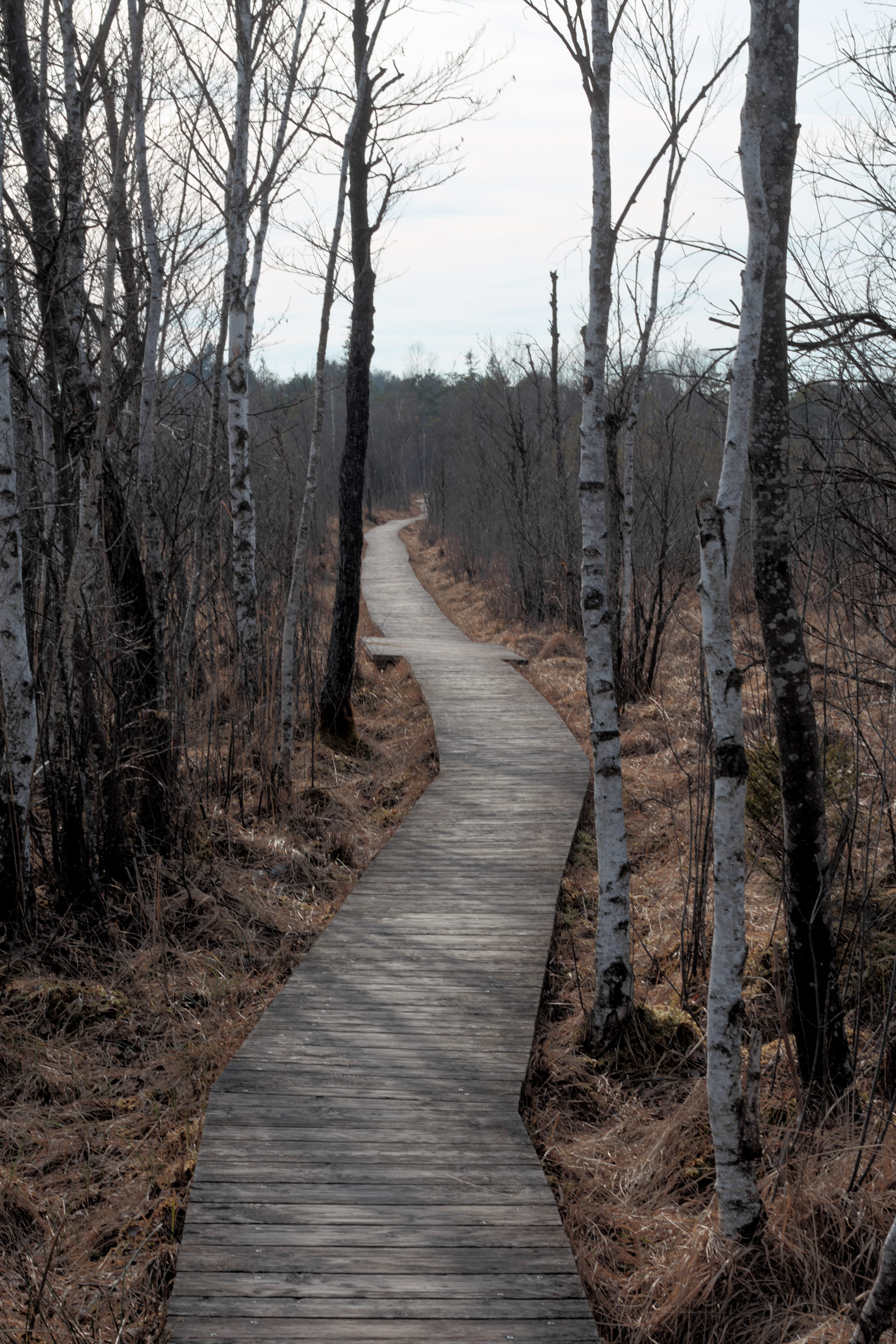 Oberösterreich, Bezirk Braunau: Der Bretterweg im Ibmer Moor befindet sich zum Teil in der Gemeinde Moosdorf sowie entlang der Gemeindegrenze zu Eggelsberg. Den Weg begleiten Informationstafeln zum Moorgebiet.